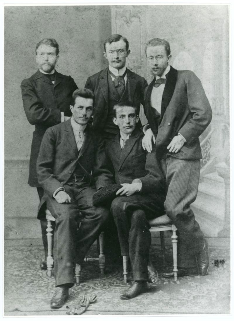 Fotografia Lucjana Rydla w gronie kolegów. Stoją, od lewej Stanisław Wyspiański, Lucjan Rydel, Karol Maszkowski; siedzą Stanisław Estreicher, Henryk Opieński